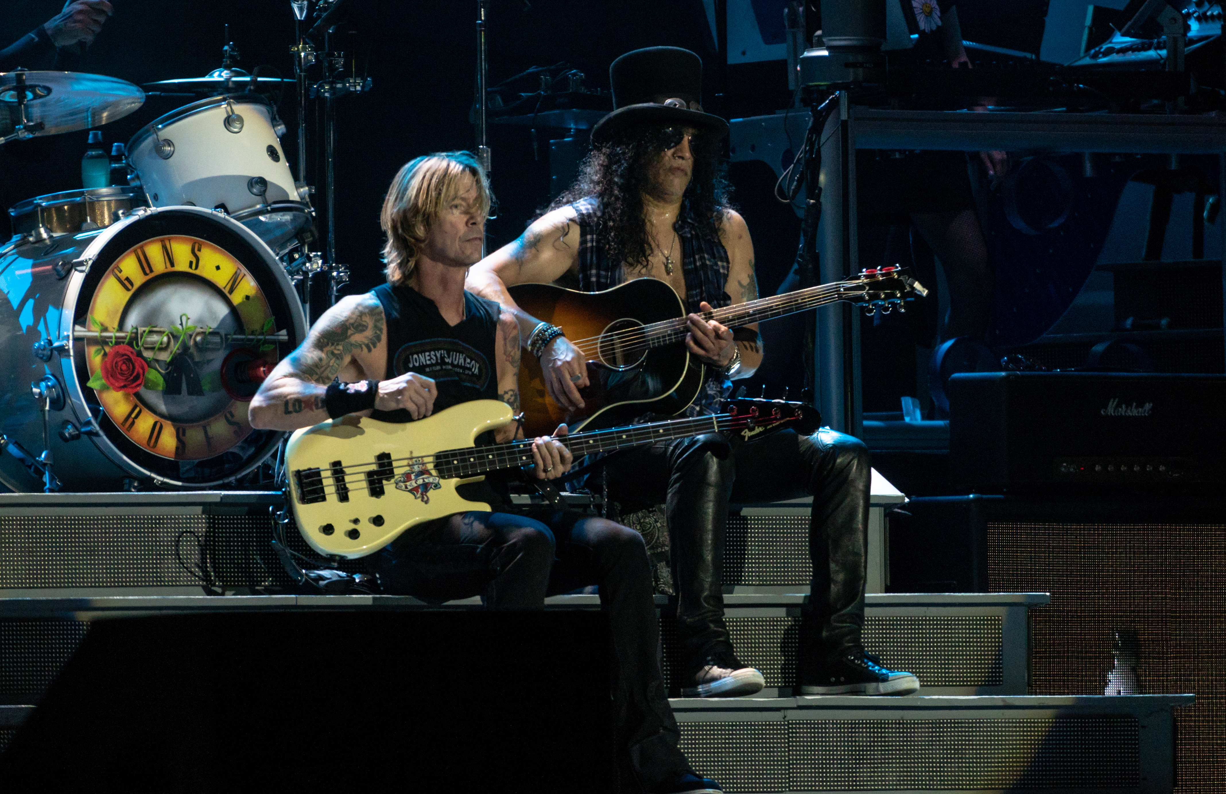 GNRChorzow090718-77